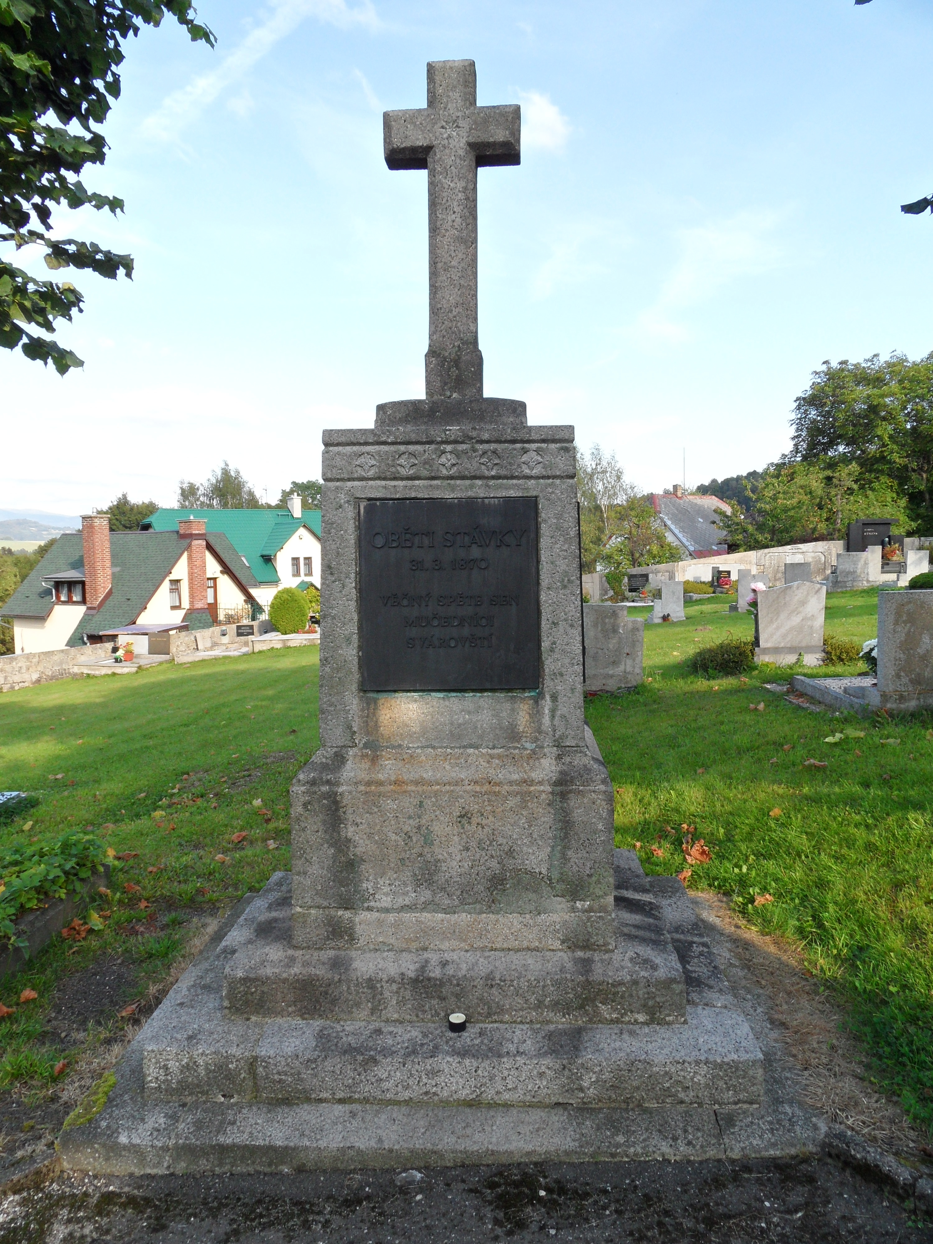 Pomník Svárovské stávky 1870